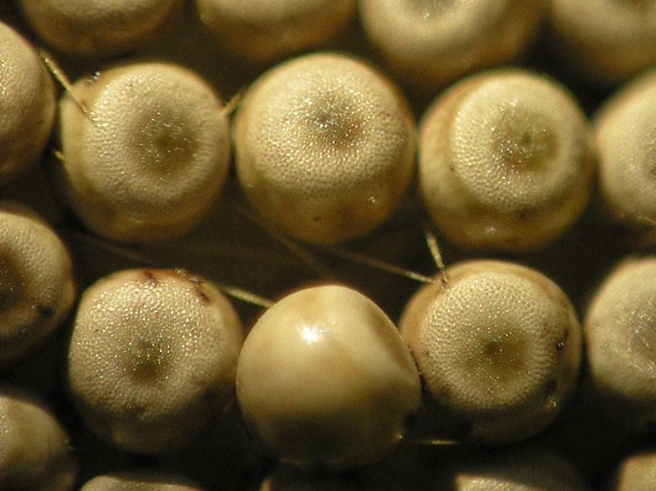 Orgyia antiqua, Znamionówka tarniówka, Polska